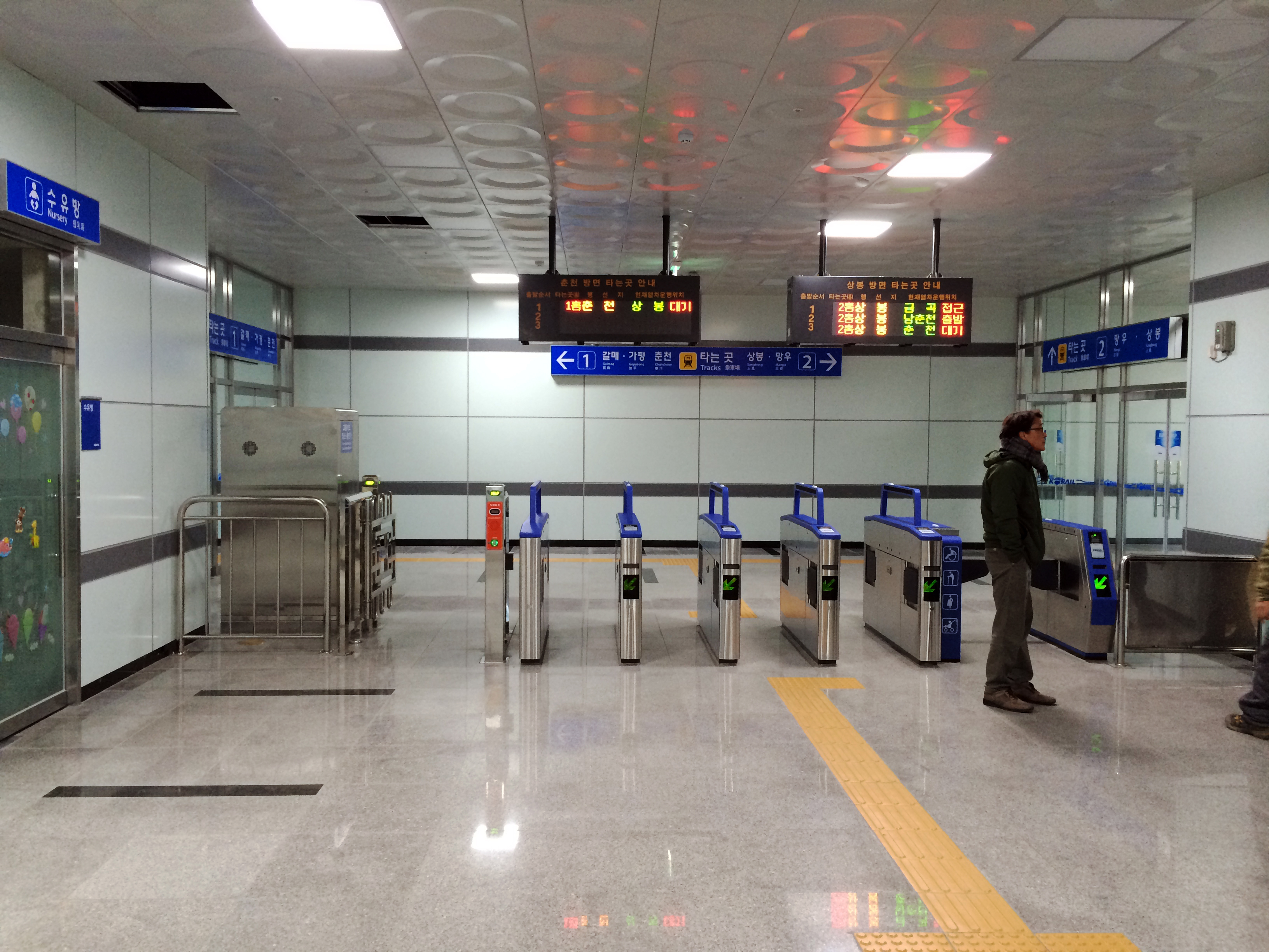 신내역 개찰구